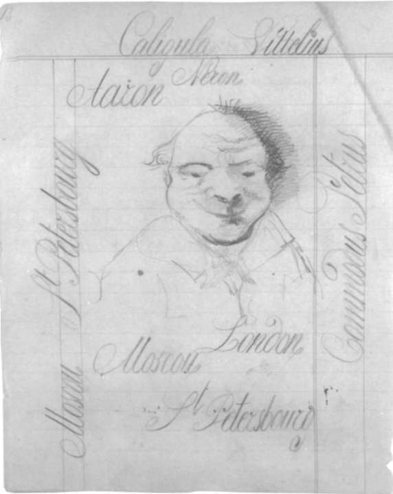 Рисунки и рукописный текст Ф.М. Достоевского. "Идиот"